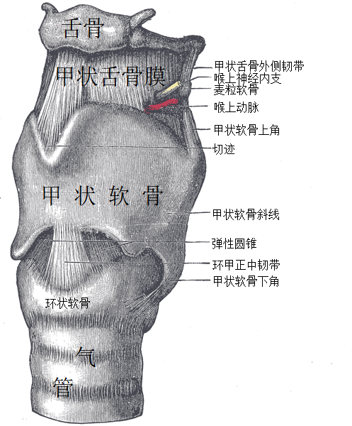 喉部韧带。前外侧视图